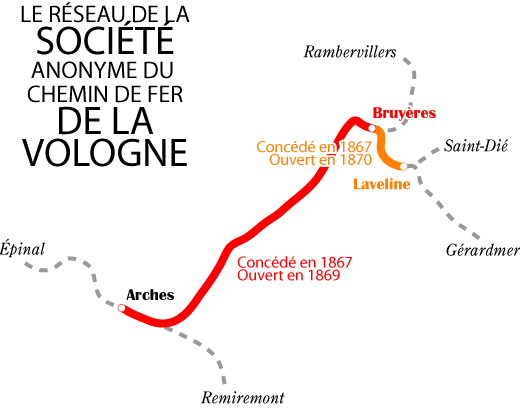 Carte du réseau de la société anonyme du chemin de fer de la Vologne (1867-1881), dessinée par moi-même pour l'article éponyme.